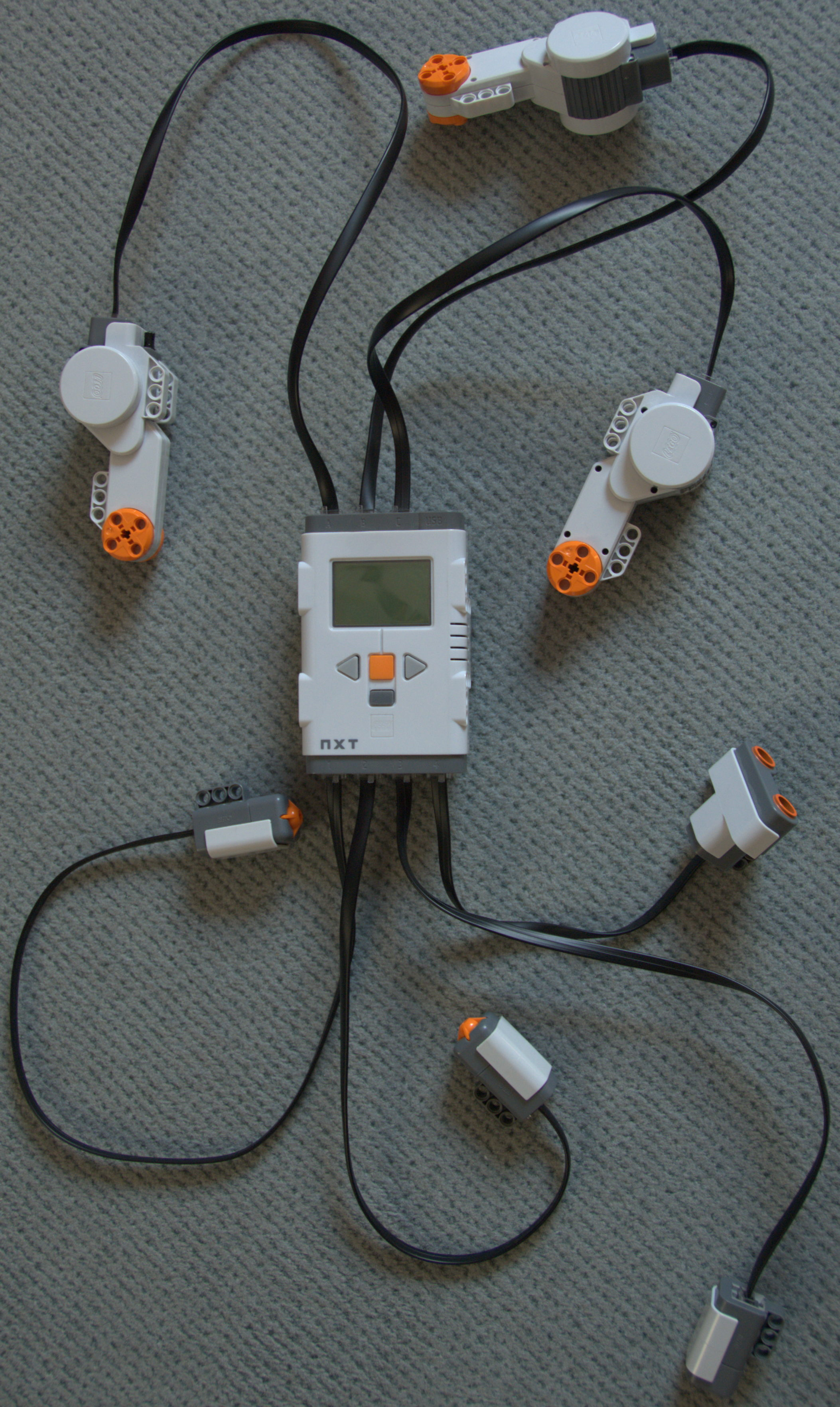 Der Lego Mindstorms NXT 2.0-Stein mit über Kabel angeschlossenen Sensoren.